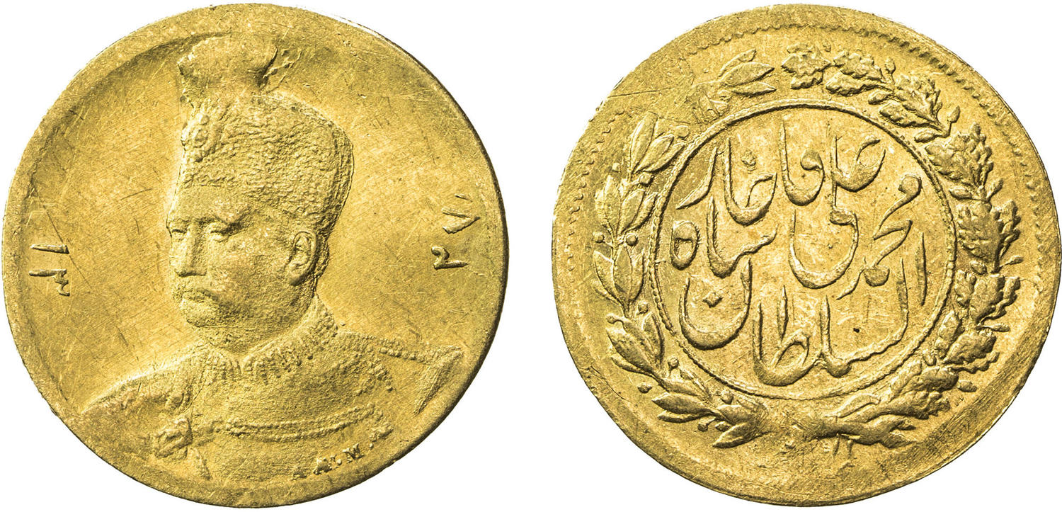 سکه یک تومانی محمدعلی شاه قاجار طراحی آلفونس میچاکس